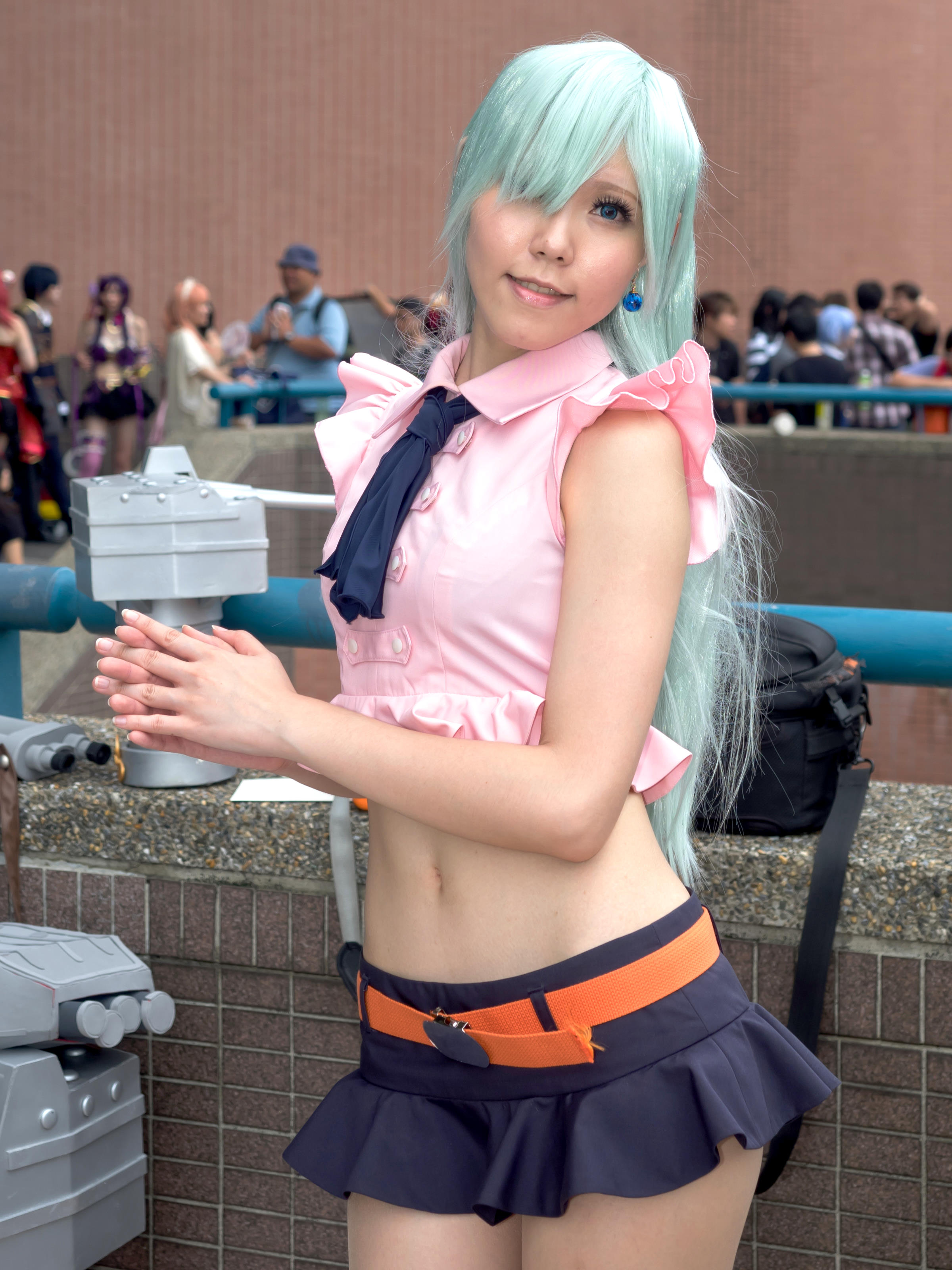 中文（台灣）: 第40屆臺灣同人誌販售會，《七大罪》伊麗莎白·里歐涅絲cosplayer。